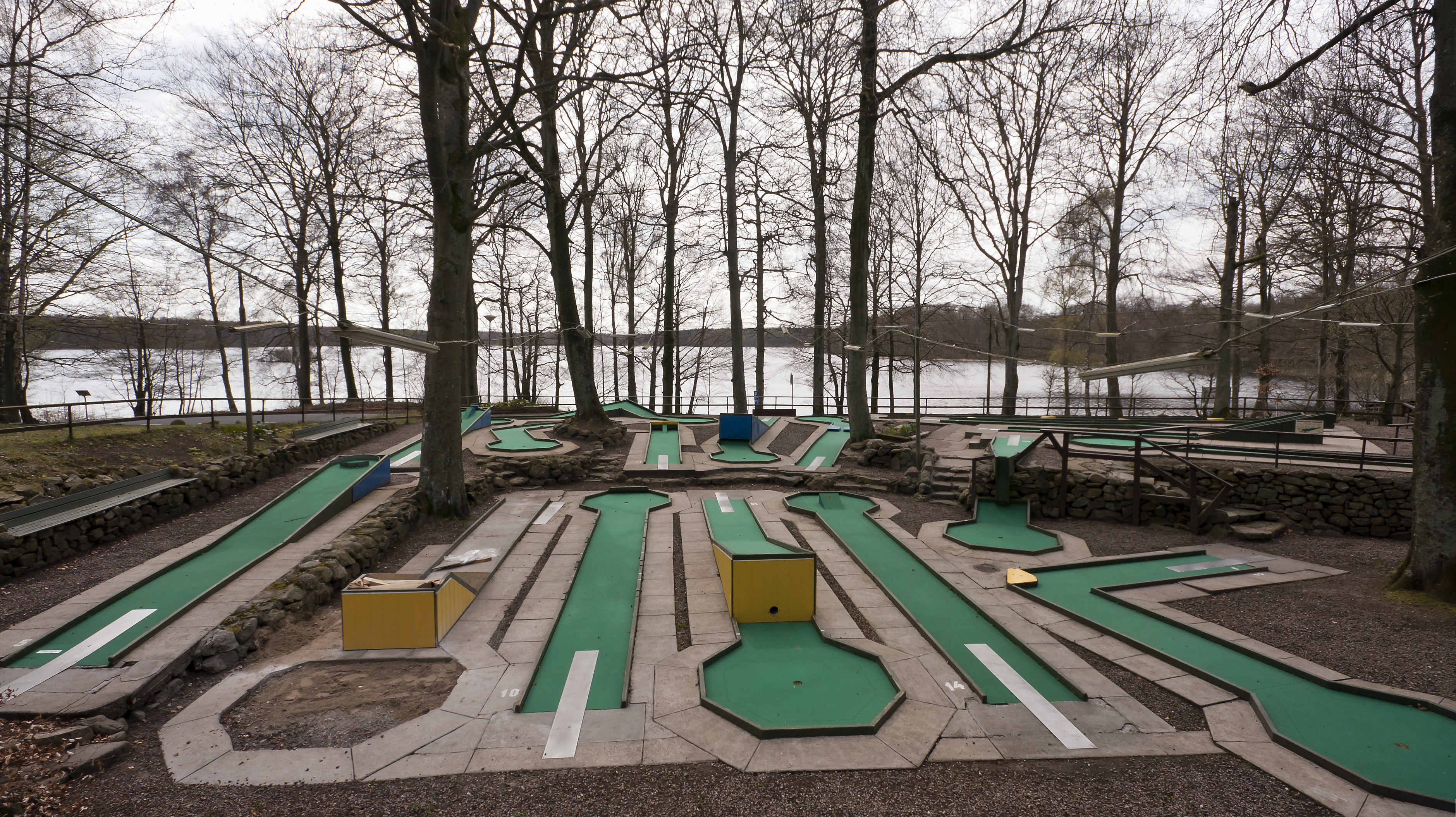 Sjövikens IFs bangolf vid Bosarpasjön.